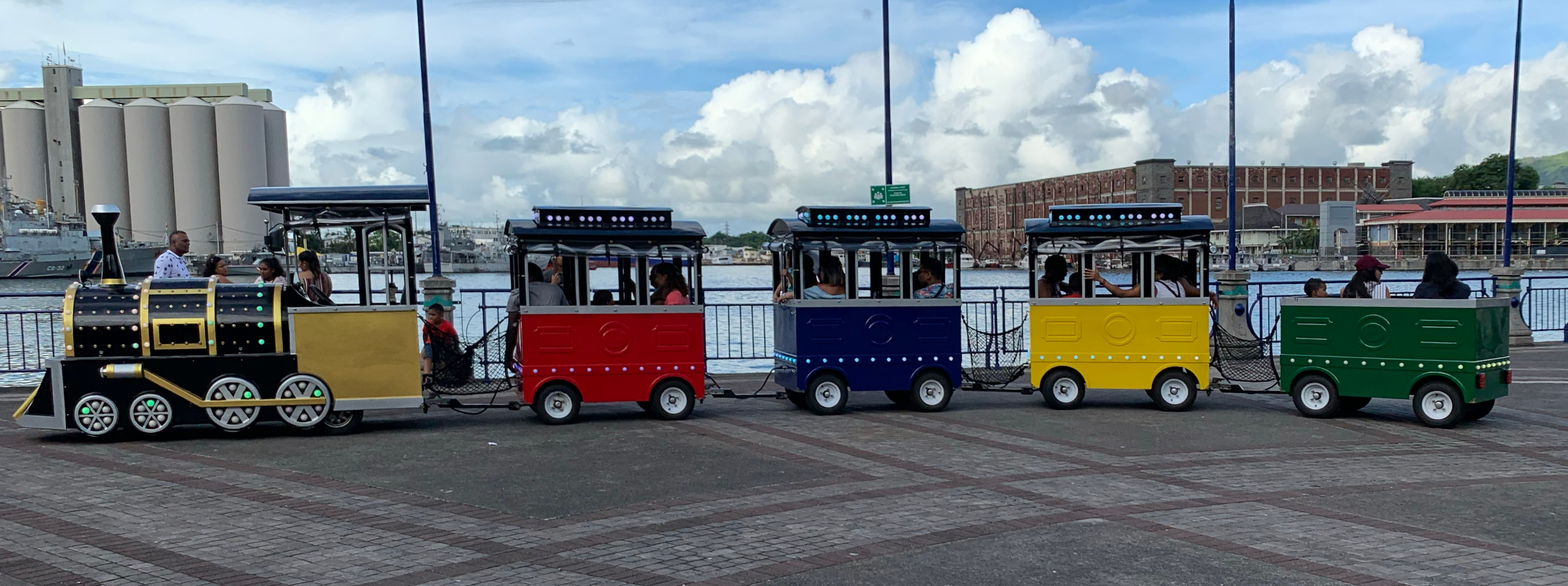 Petit train touristique à Caudan Waterfront (Port Louis, Maurice).